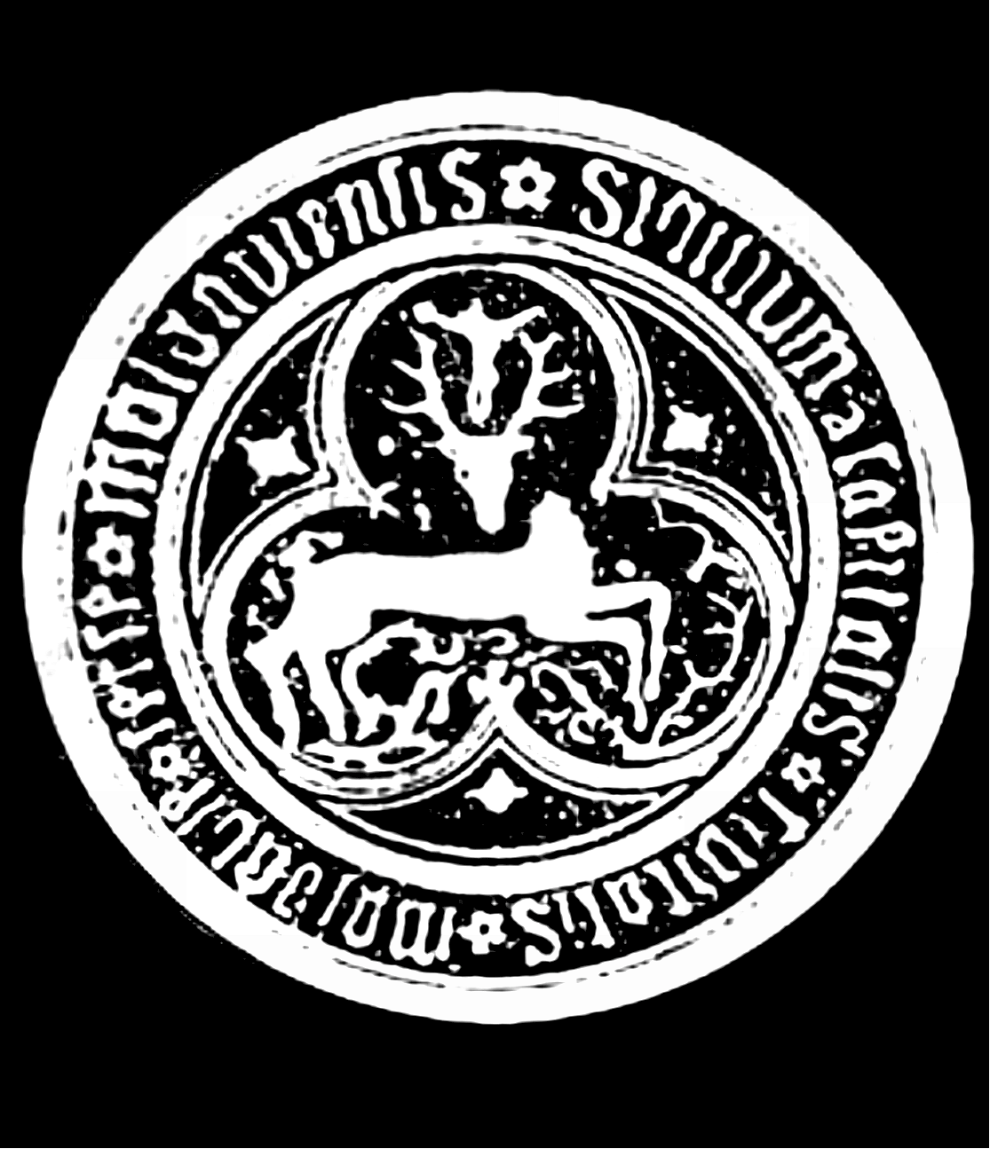 Siegel von Baia, Lkr. Suceava, seit dem 13. Jh